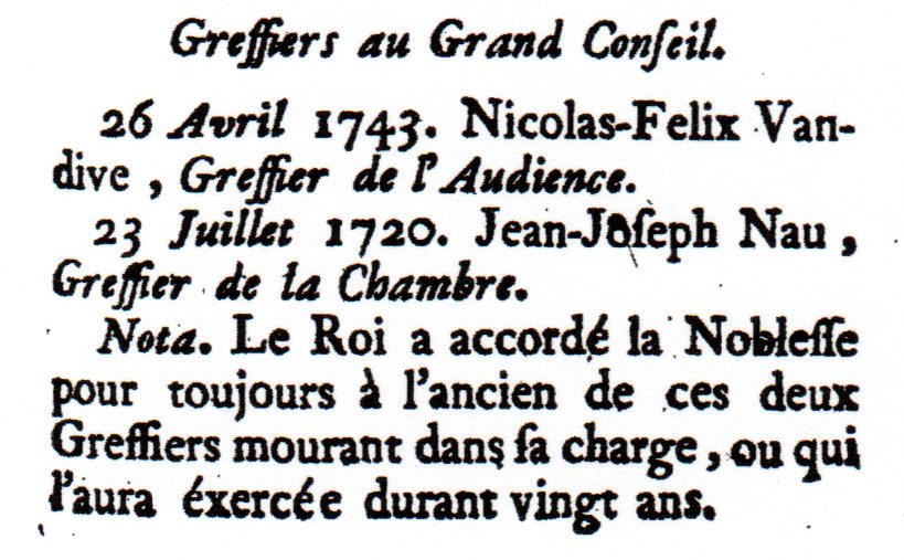 Détail de la page 383, du tome quatrième de L'ETAT DE LA FRANCE, publié à Paris, chez Ganeau, rue Saint Severin, près l'Eglise, aux Armes de Dombes et à Saint-Louis, M. DCC. XLIX, avec privilège du roi. : "Greffiers au Grand Conseil. 26 Avril 1743. Nicolas-Felix Vandive, Greffier de l'Audience. 23 Juillet 1720. Jean-Joseph Nau, Greffier de la Chambre. Nota. Le Roi a accordé la Noblesse pour toujours à l'ancien de ces deux Greffiers mourant dans sa charge, ou qui l'aura éxercée durant vingt ans."